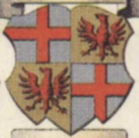 Wappen des Konstanzer Bischofs Gebhard von Zähringen